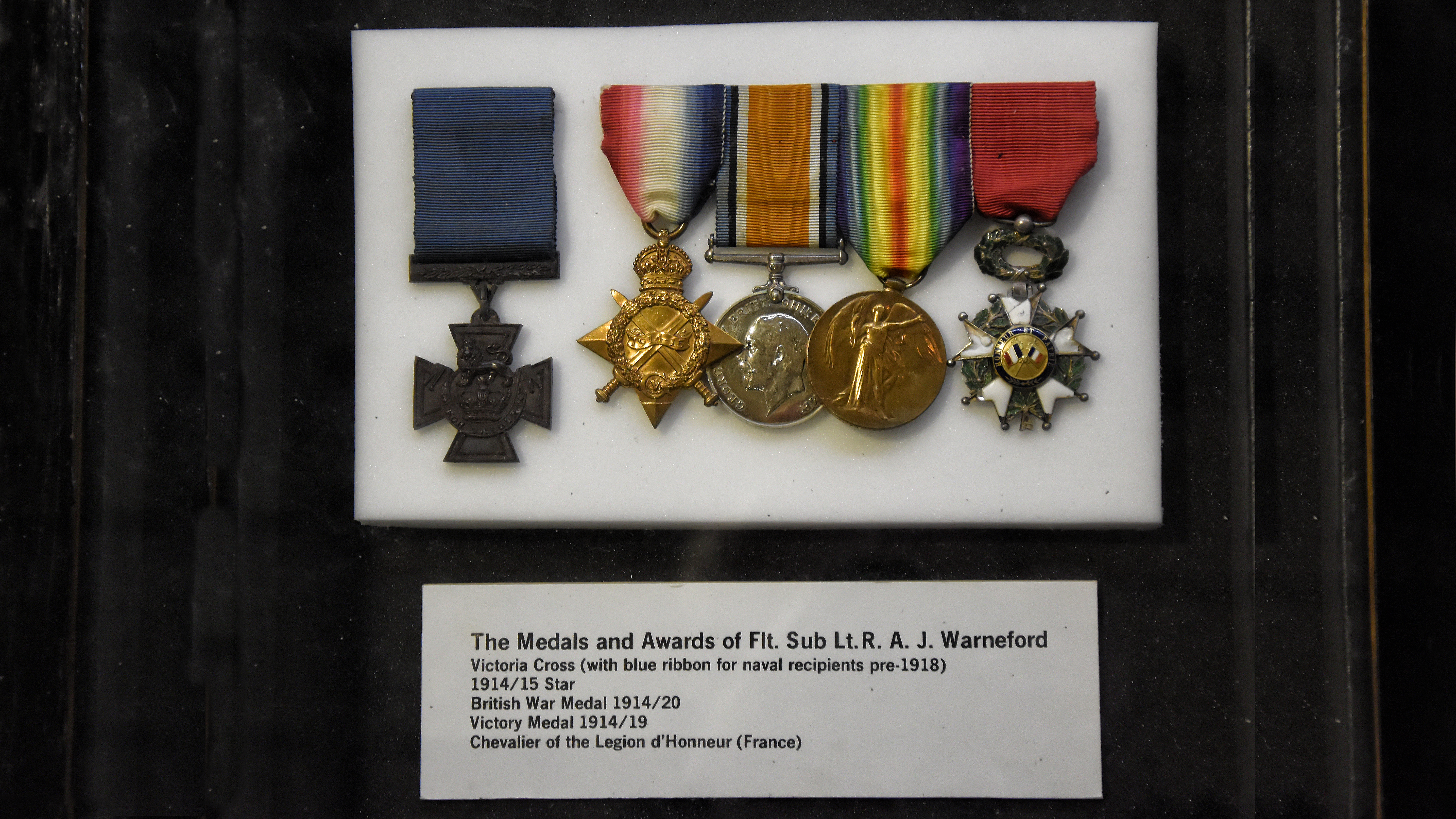 Eretekens uitgereikt aan Reginald Warneford - Fleet Air Arm Museum, Yeovilton, UK